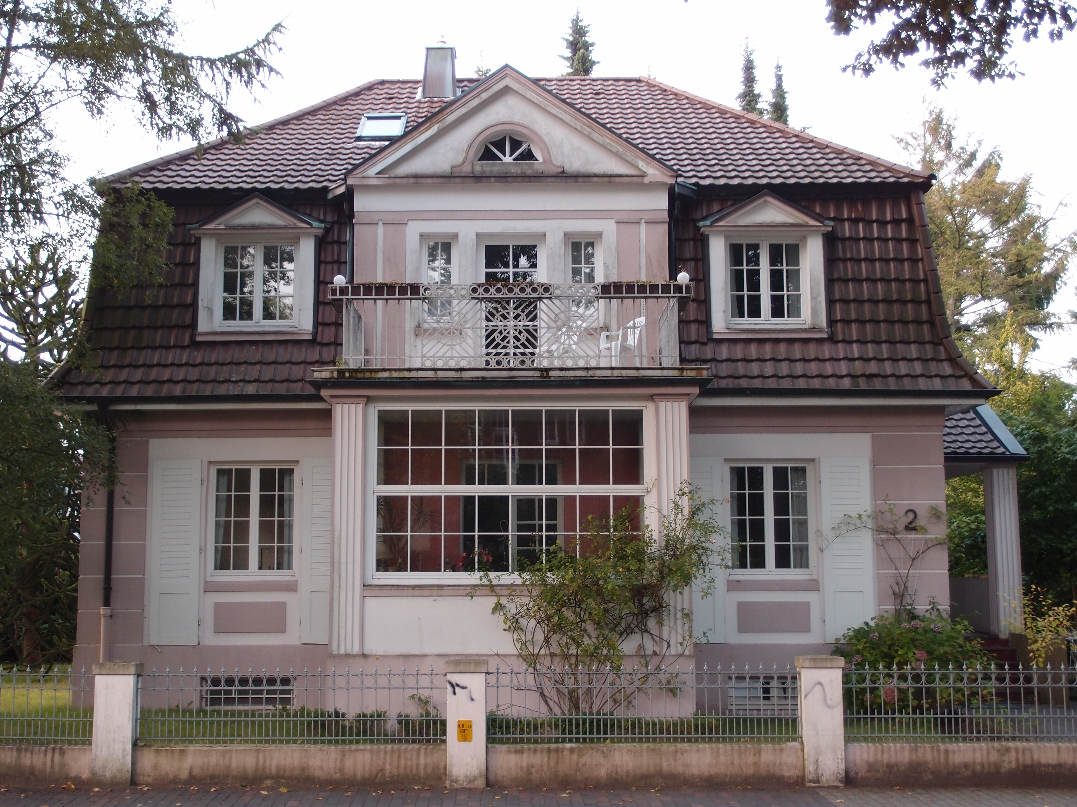 Cuxhaven Gorch-Fock-Strasse 2 Wohnhaus Strassenansicht